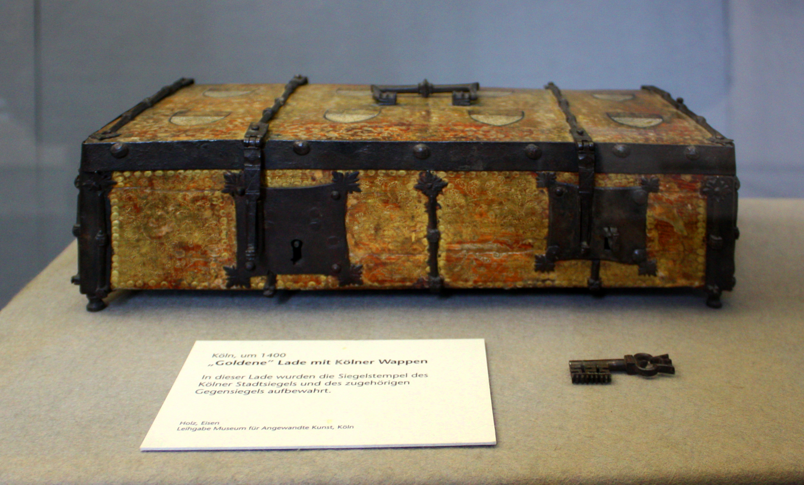 Stadt Köln, mit Wappen versehene "Goldene Lade" zur Sicherung der Stadtsiegel (Stempel und Gegenstück). Holz mit Eisenbeschlag um 1400